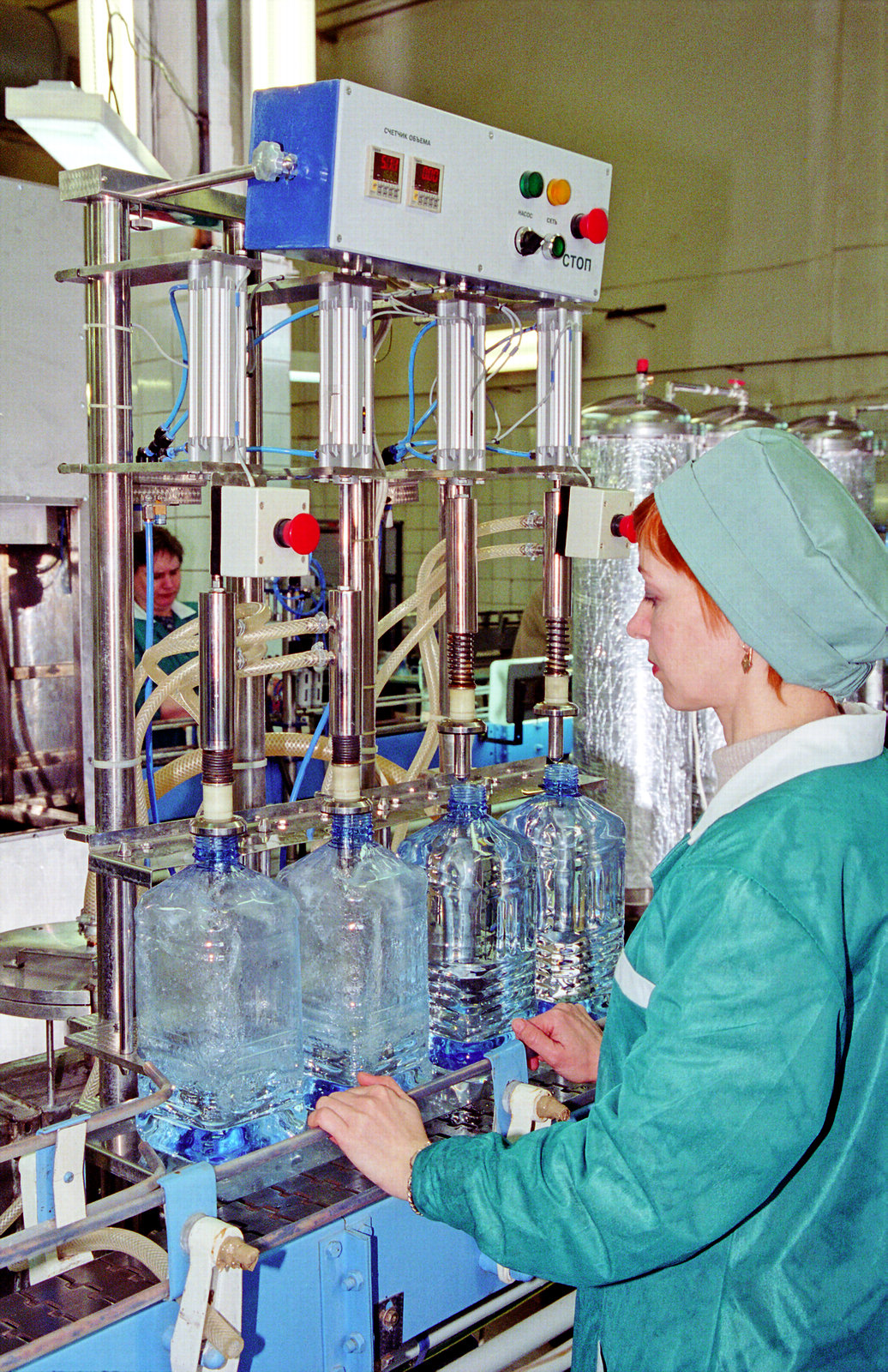 Дозатор питьевой воды. ООО «Золотое кольцо Руси», технопарк «Славич».